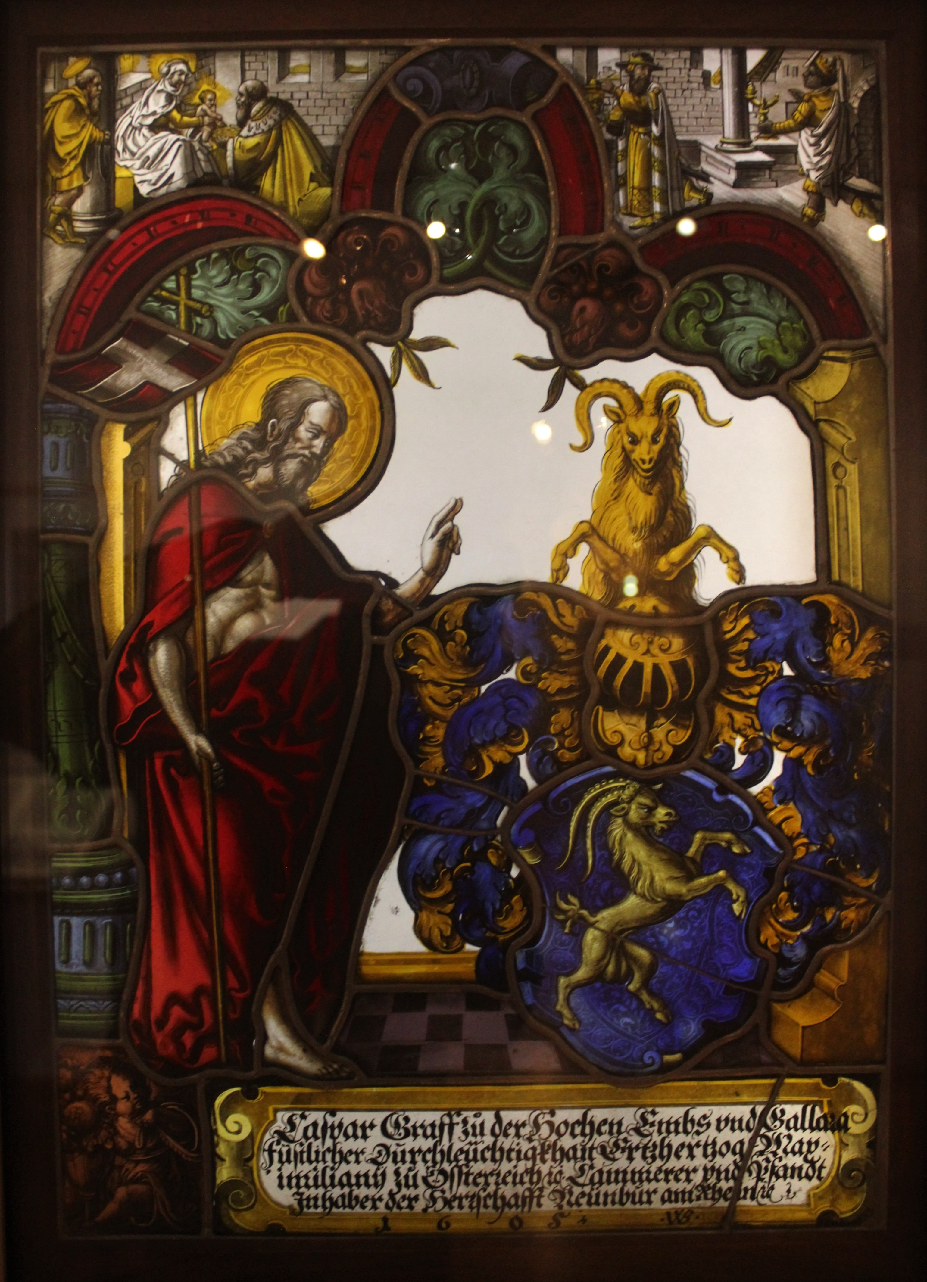 Wappenscheibe von Graf Kaspar von Hohenems. Er erwarb 1613 Vaduz und Schellenberg und plante eine Herrschaft vom Bodensee bis zur Luziensteig. Die Wappenscheibe ist Teil der Dauerausstellung im Liechtensteinischen Landesmuseum.